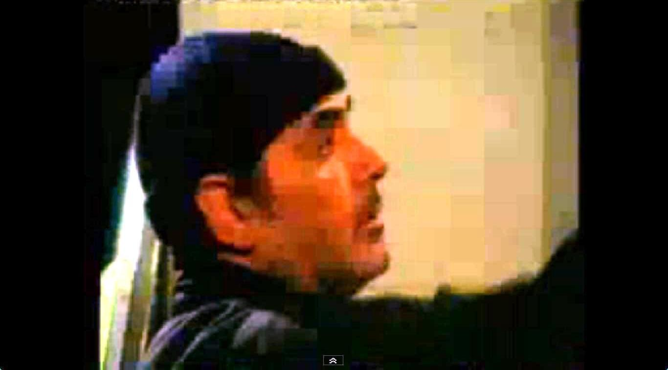 Tano Festa al lavoro